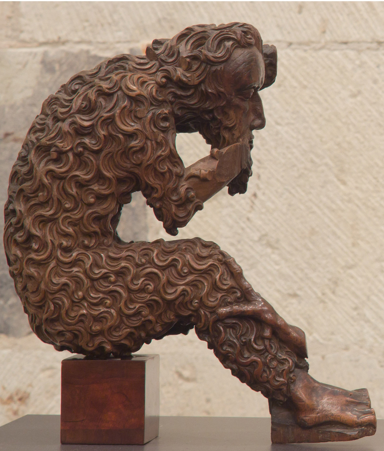 Homme sauvage (morceau de sculpture sur bois où l'on distingue la serre d'un rapace qui enserre le tibia droit de l'homme sauvage), musée de Cologne